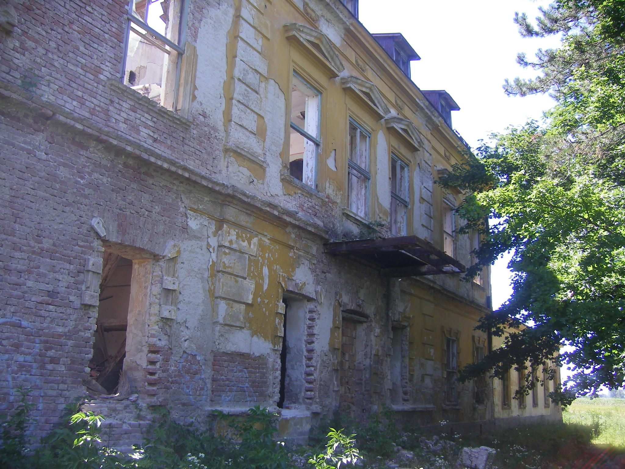 Ács/Concóhát - Degenfeld-Schonburg-kastély